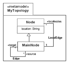 domeinu baten metamodeloa